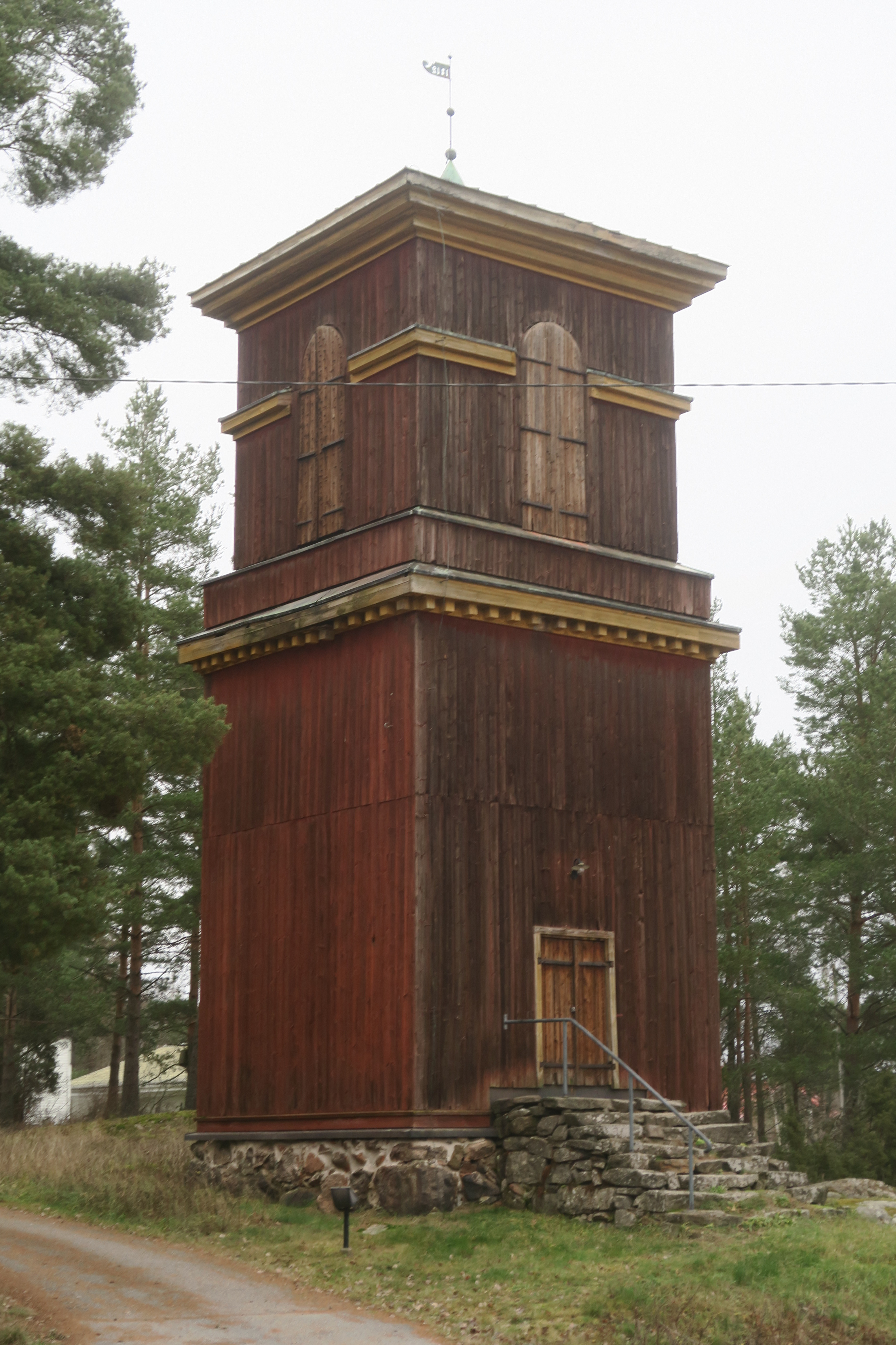 Lemun kirkon kellotapuli